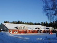 Furudals hockeycenter på vintern